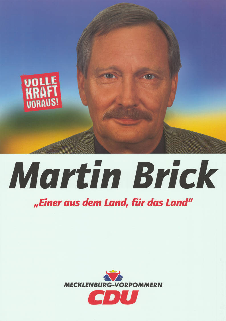 Volle Kraft voraus! Martin Brick "Einer aus dem Land, für das Land" Mecklenburg-Vorpommern CDU Abbildung: Porträtfoto Plakatart: Kandidaten-/Personenplakat mit Porträt Auftraggeber: CDU Mecklenburg-Vorpommern Objekt-Signatur: 10-034 : 306 Bestand: Landtagswahlplakate Mecklenburg-Vorpommern (10-034) GliederungBestand10-18: Landtagswahlplakate Mecklenburg-Vorpommern (10-034) » CDU Lizenz: KAS/ACDP 10-034 : 306 CC-BY-SA 3.0 DE